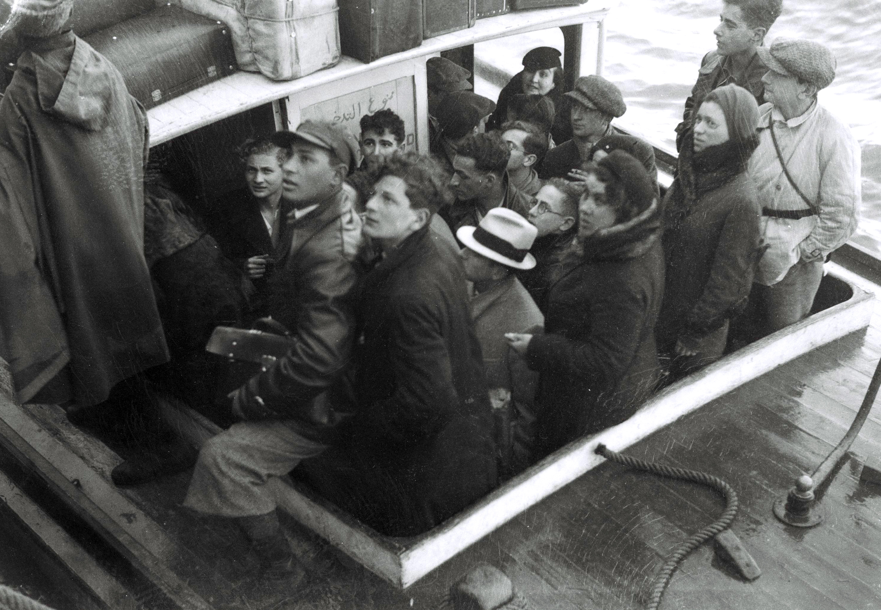 THE FIRST GROUP OF YOUTH ALIYA ARRIVING AT THE HAIFA PORT (19/2/1934). קבוצת בני נוער של "עליית הנוער", מגיעה לנמל חיפה.